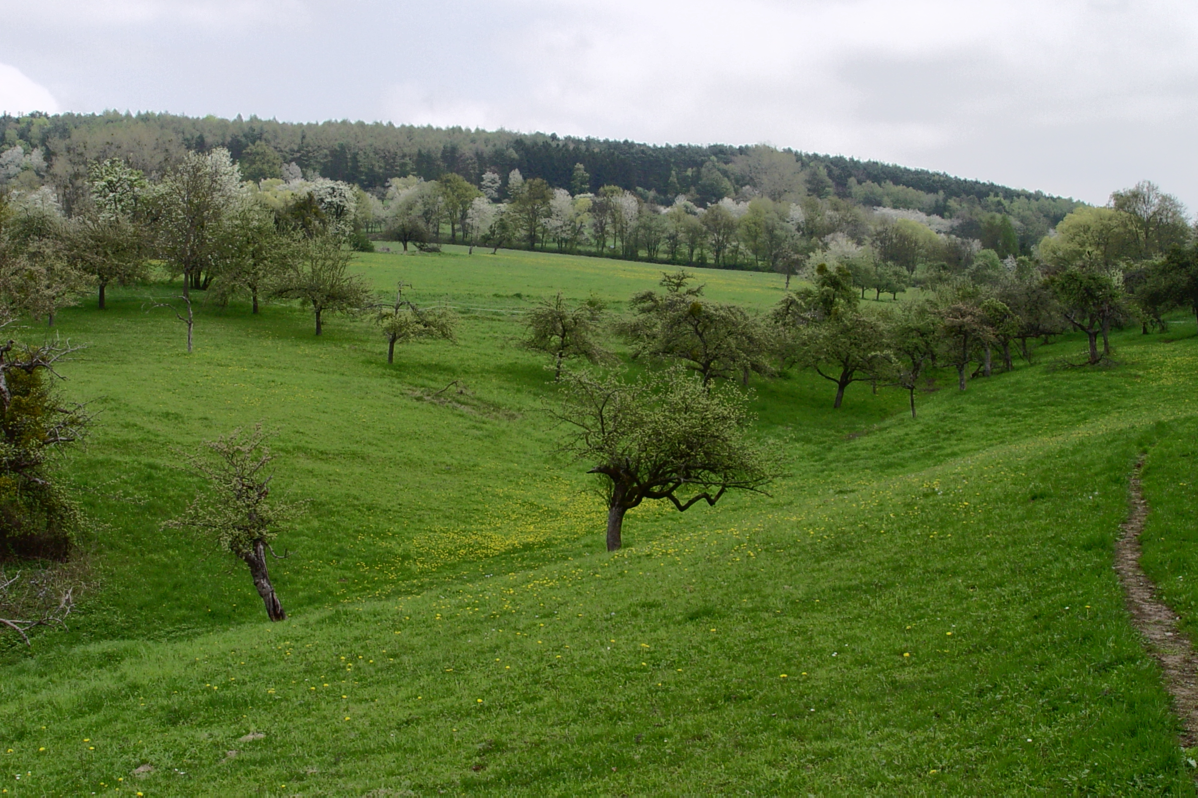 LSG-00561.01 im Naturpark Spessart: Wiese bei Aschaffenburg-Gailbach